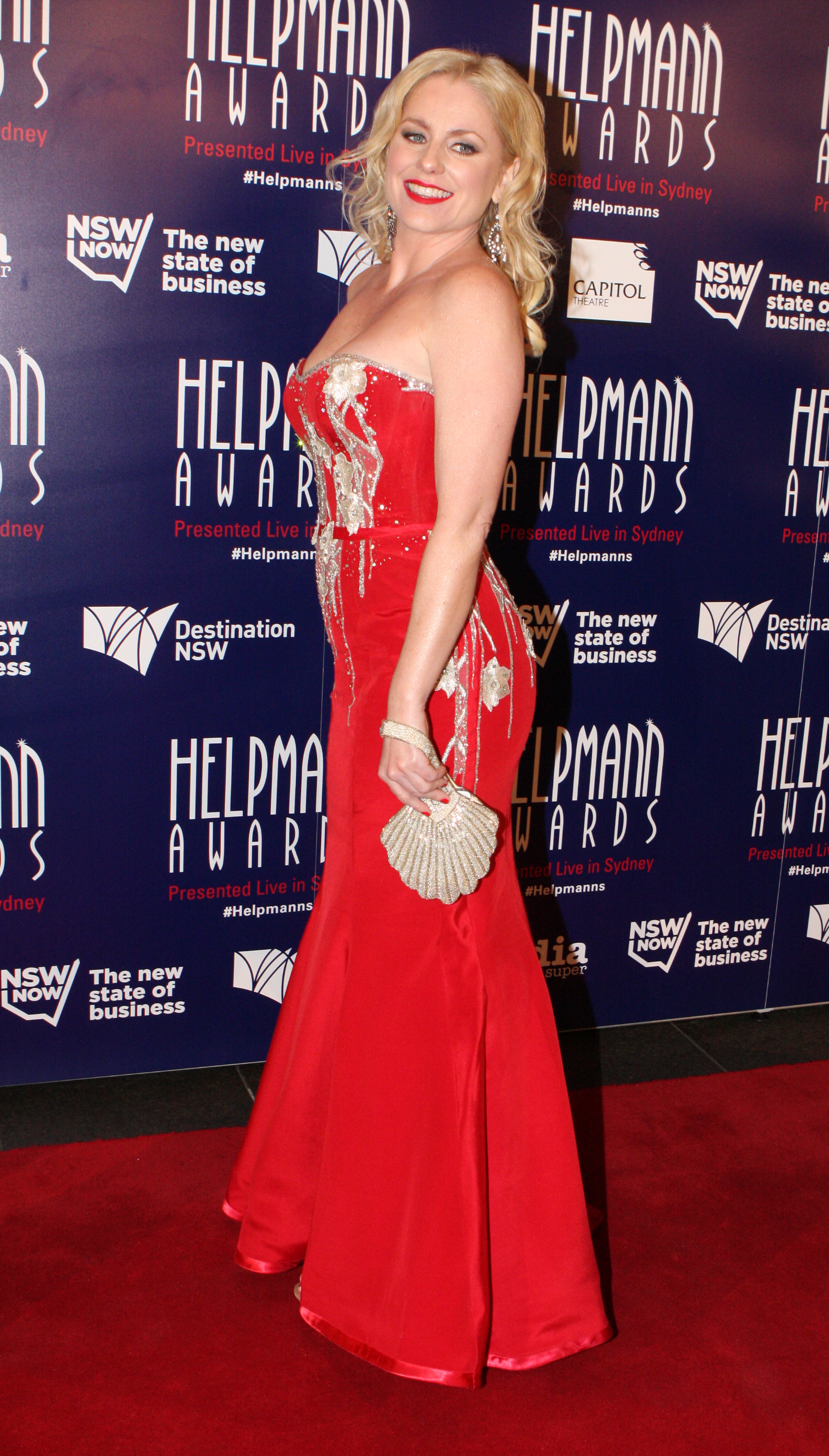 Helen Dallimore